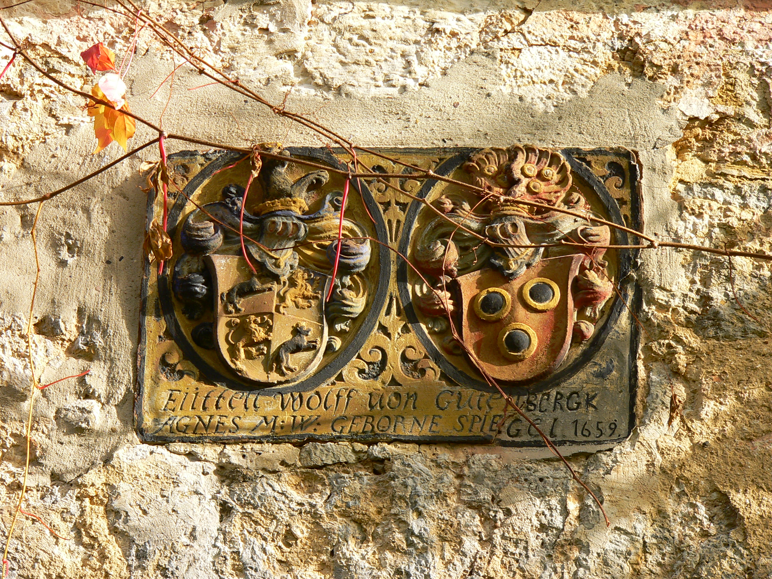 Wappenstein am Junkershof Meimbressen in Calden-Meimbressen im Landkreis Kassel, Hessen, Deutschland